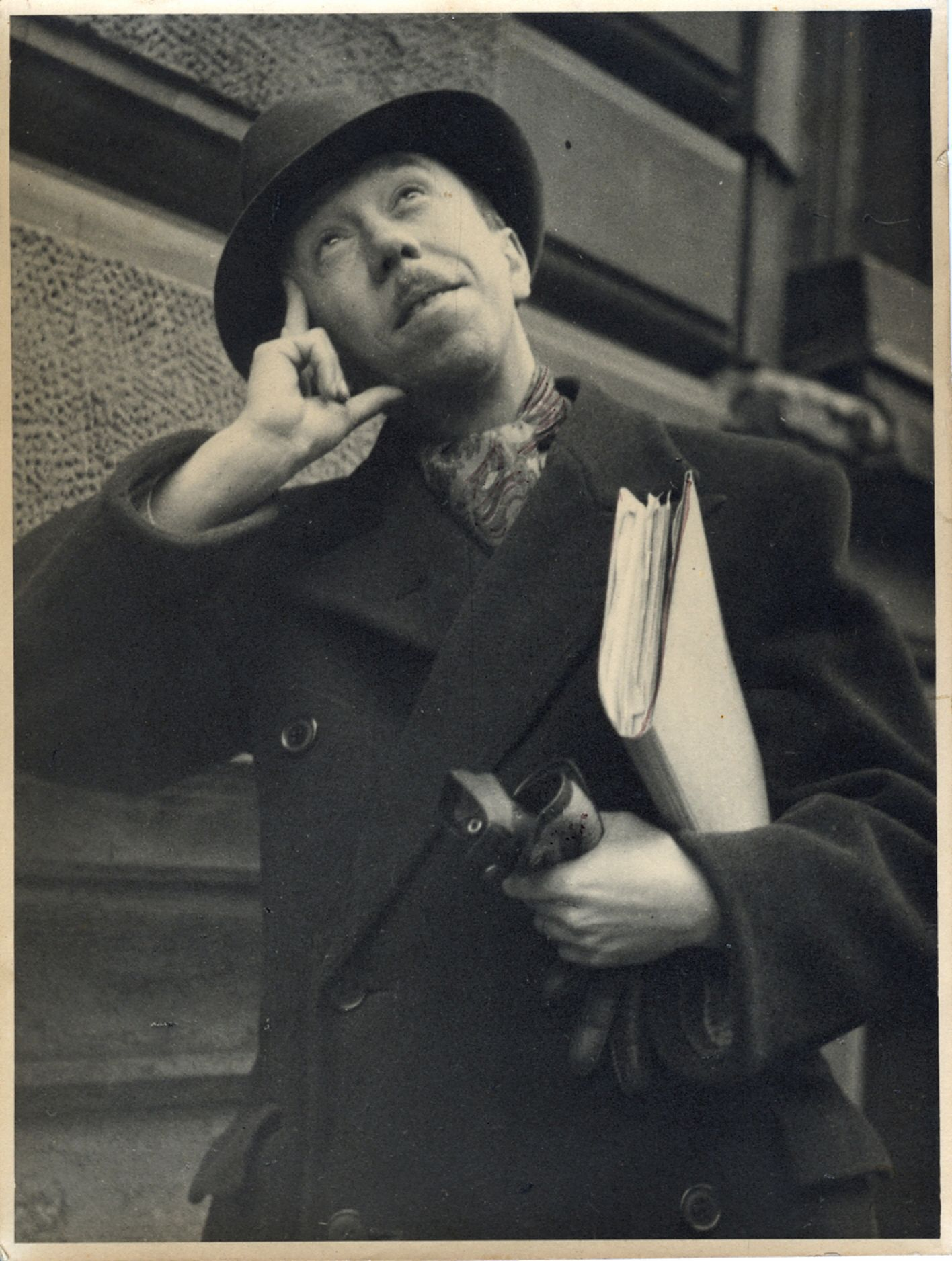 Jiří Cílek, grafik, malíř, pedagog Asi 1943, Praha – Královské Vinohrady